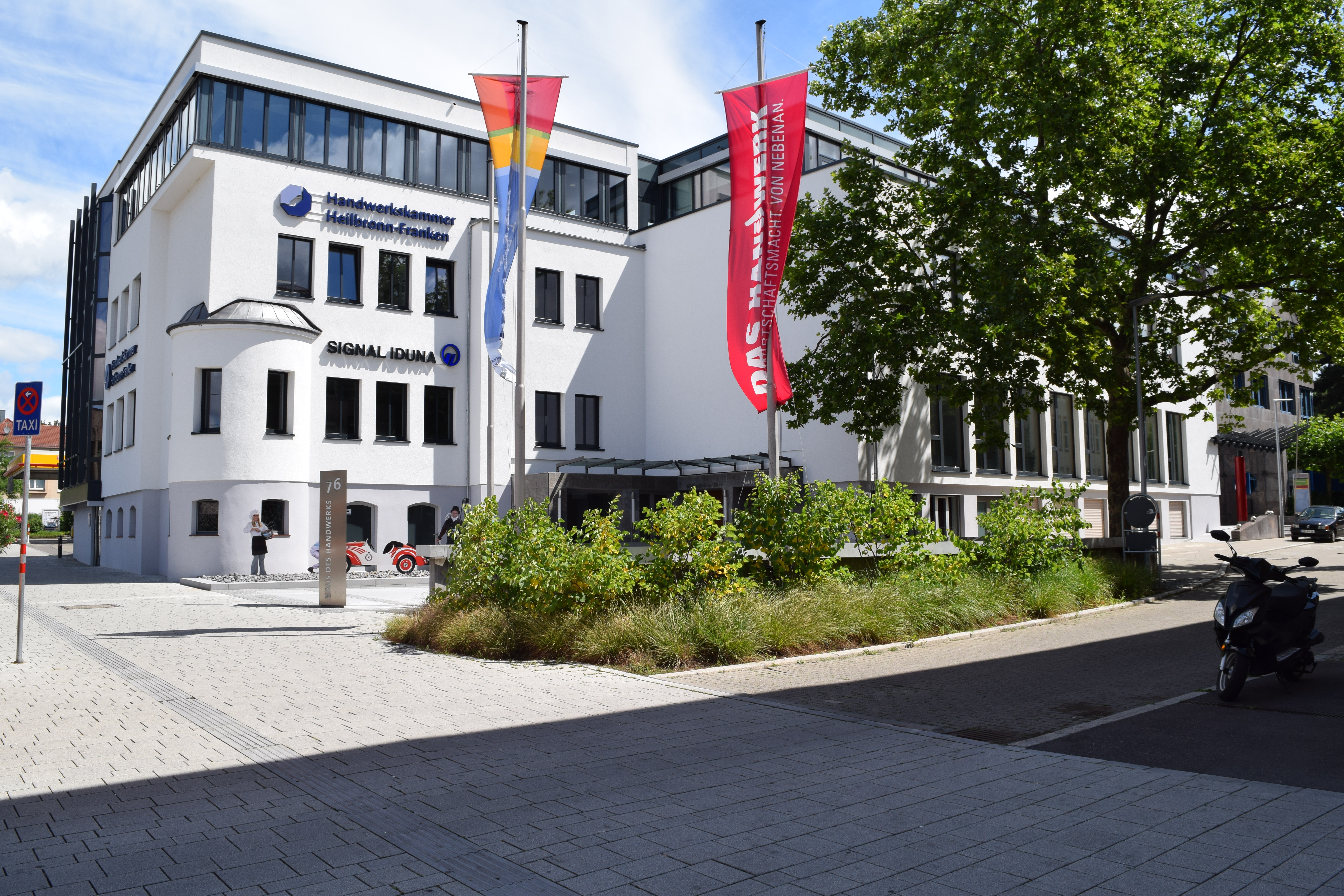 Gebäude der Handwerkskammer Heilbronn-Franken